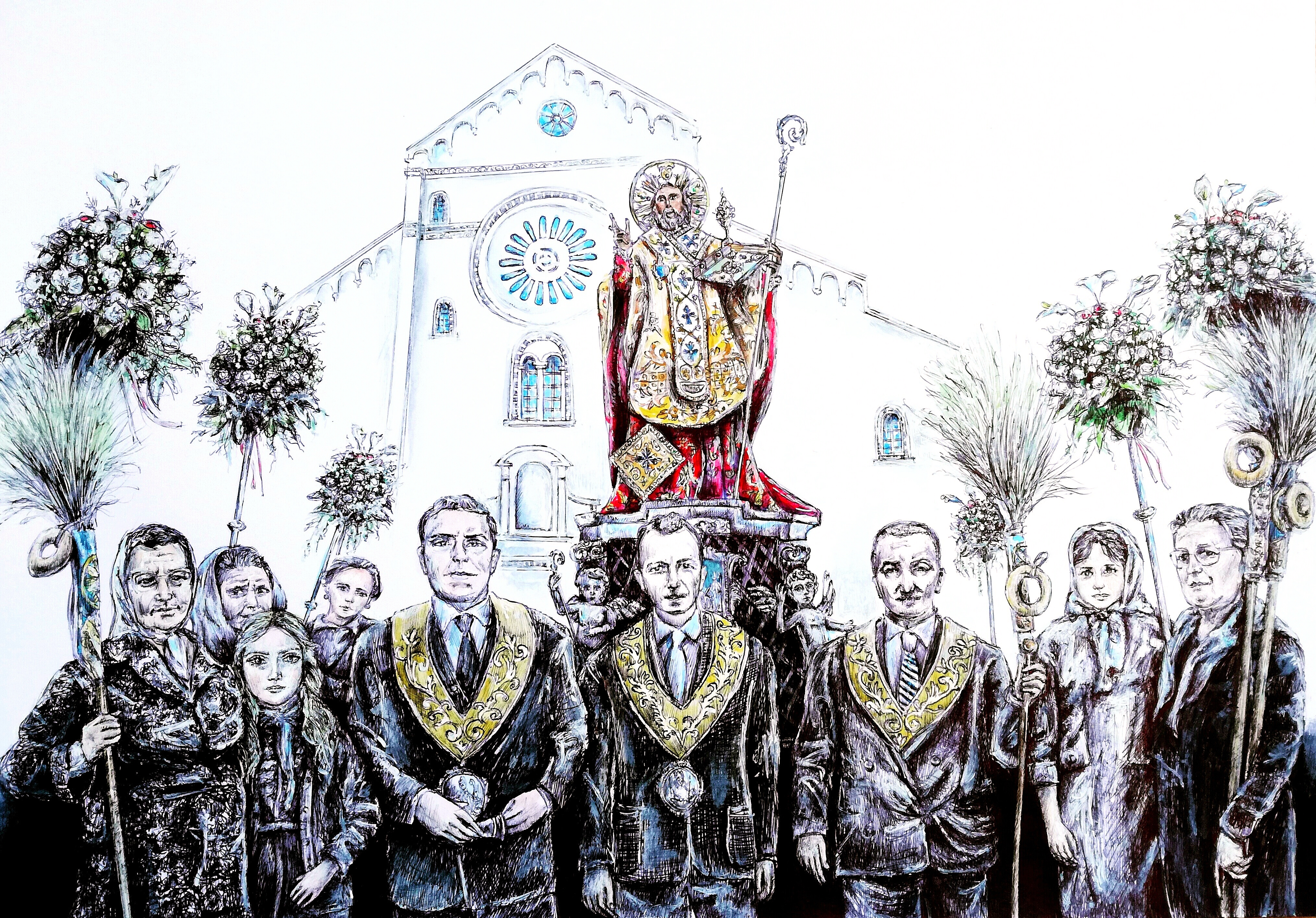 Illustrazione "Processione dei pellegrini di San Nicola a Bari", 2019